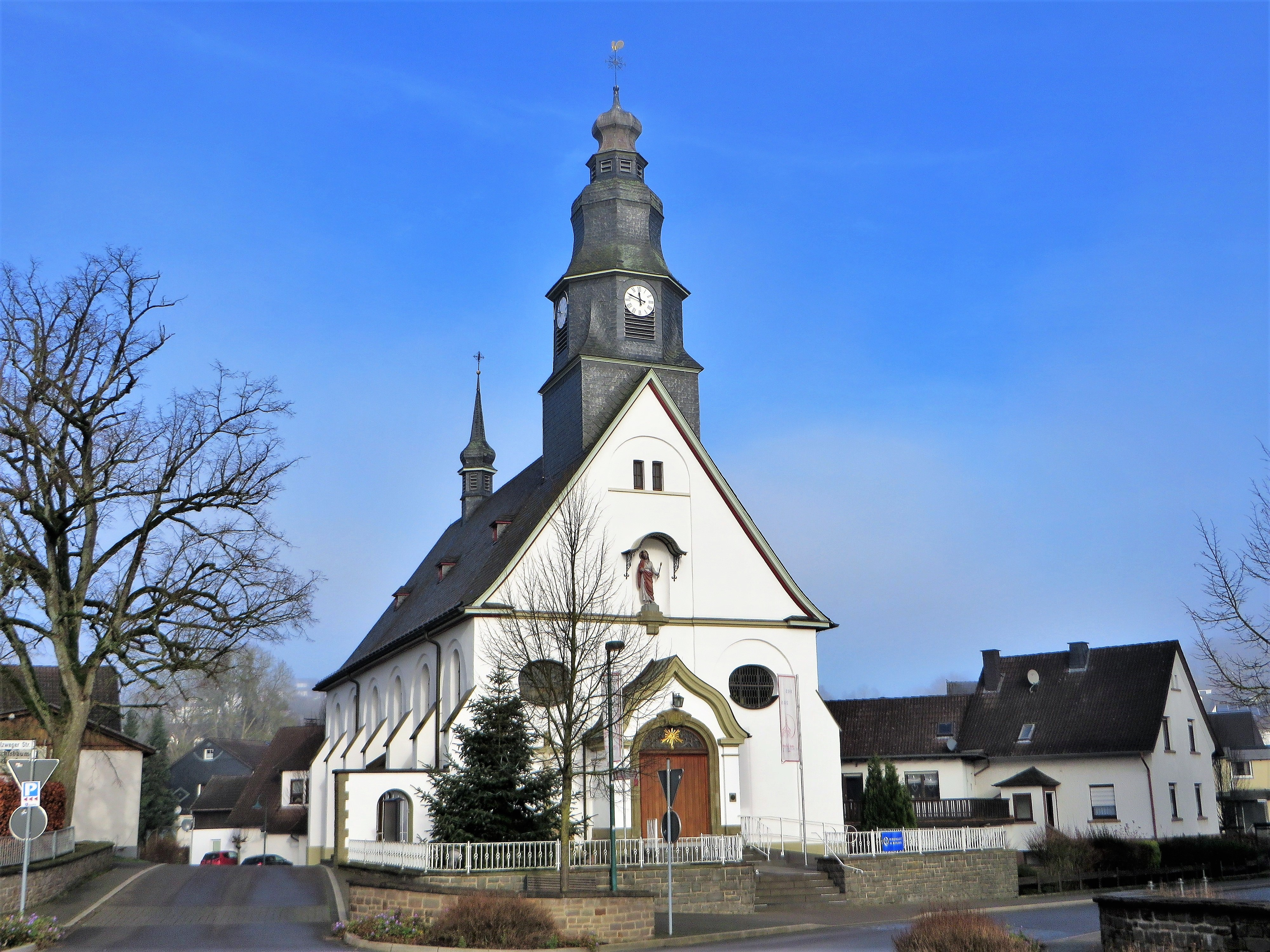 Denkmalgeschützte katholische Pfarrkirche St. Margaretha im Attendorner Ortsteil Ennest, Margarethastraße 2. Die vom Architekten Franz Schneider geplante und am 7. November 1915 geweihte Kirche besteht aus einem einschiffigen Langhaus mit barocken Einrichtungsgegenständen. Die Kirche wird von einem Turm in Form eines Dachreiters bekrönt. This is a photograph of an architectural monument.It is on the list of cultural monuments of Attendorn